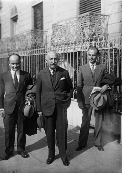 Panagiotis Tsladaris, primer ministro griego, 1933.